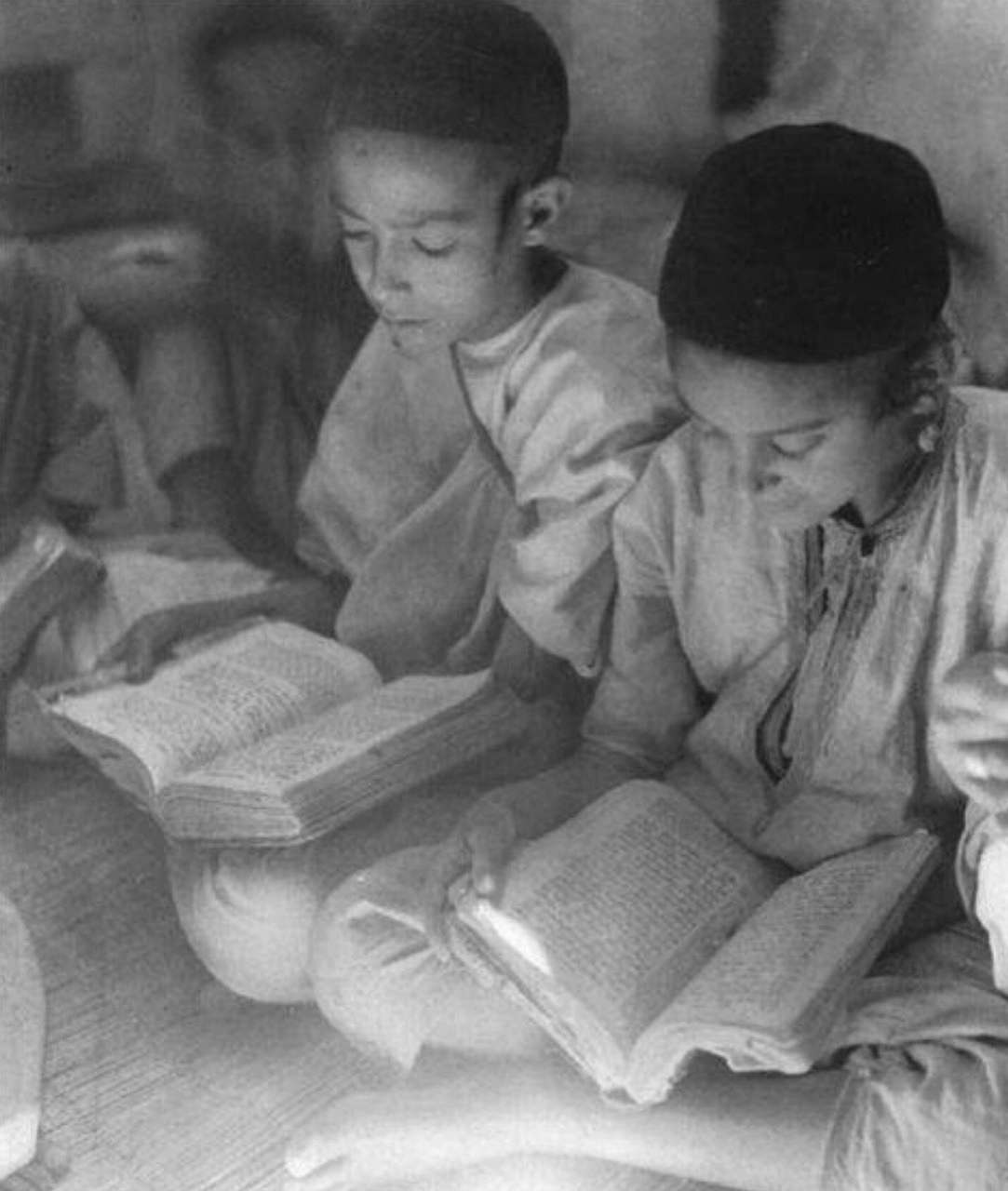 ילדים יהודים בתלמוד תורה בתיזנית שבמרוקו, 1935